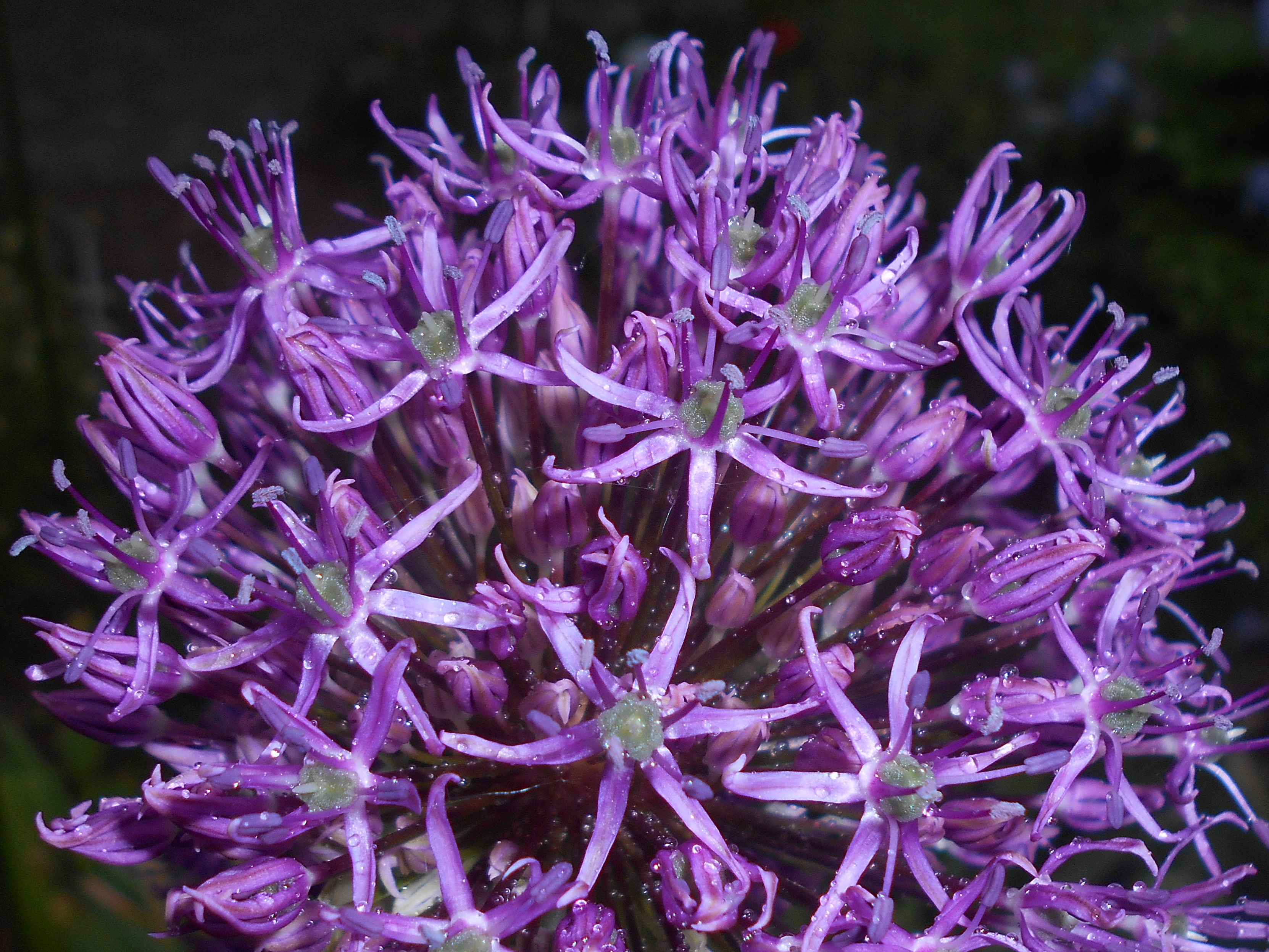 Czosnek aflatuneński (Allium aflatunense), Ogród Botaniczny UMCS w Lublinie.